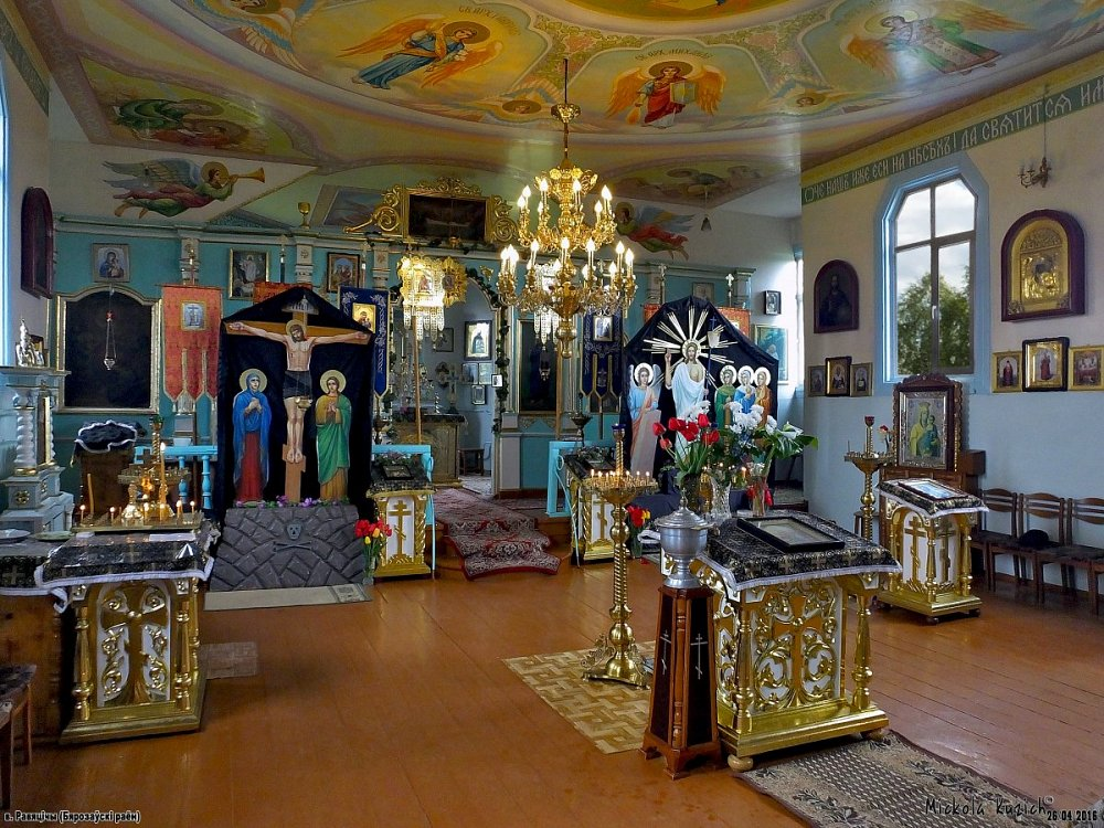 Равяцічы. Свята-Пакроўская царква